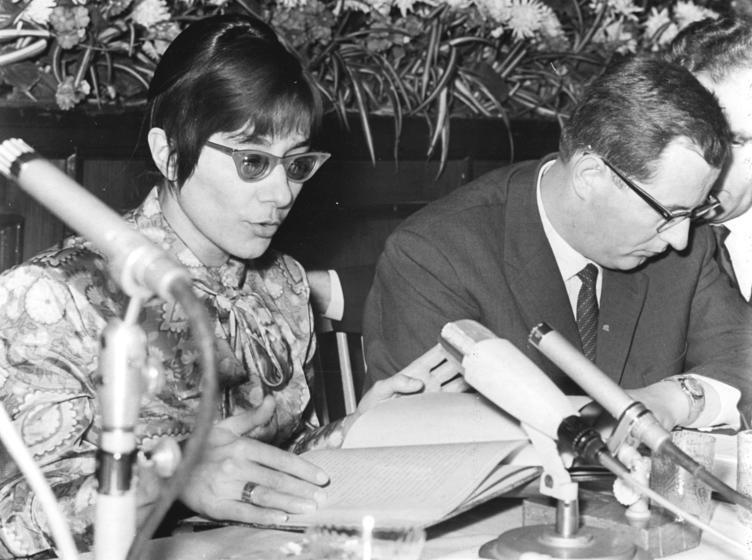 Zentralbild Franke 9.12.1966 Berlin: 20 Jahre Verlag Neues Leben Brigitte Reimann war eine der Autoren des Verlages Neues Leben, die anläßlich des 20jährigen Bestehens des Verlages in einer Feierstunde im Haus des Zentralrates der FDJ am 9.12.66 aus Manuskripten bisher nicht veröffentlichter Arbeiten lasen. Rechts daneben Cheflektor Walter Lewerenz.